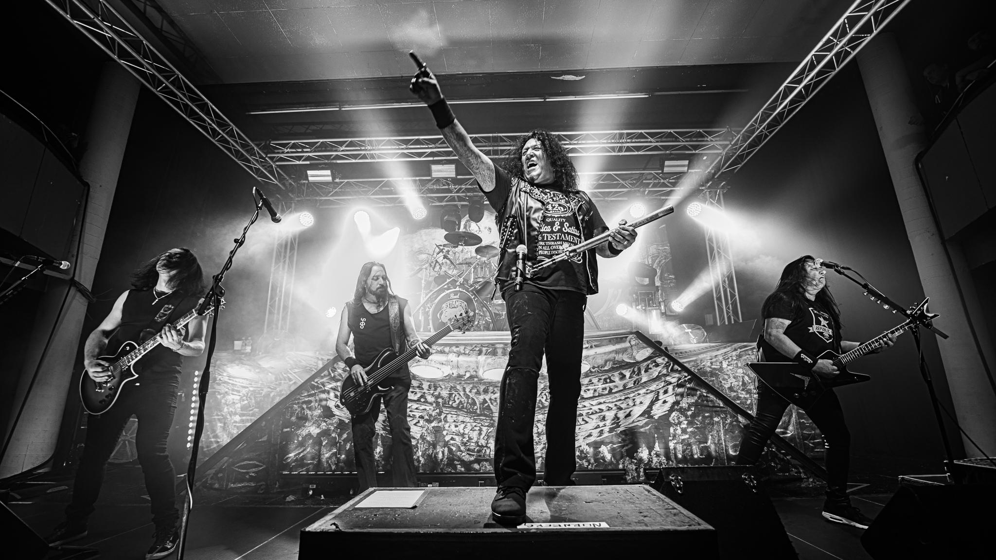 Alex Skolnick,Chuck Billy,Concertbüro Franken,Eric Peterson,Konzert,Livekonzert,Livemusik,Löwensaal,Musik,Steve Di Giorgio,Testament